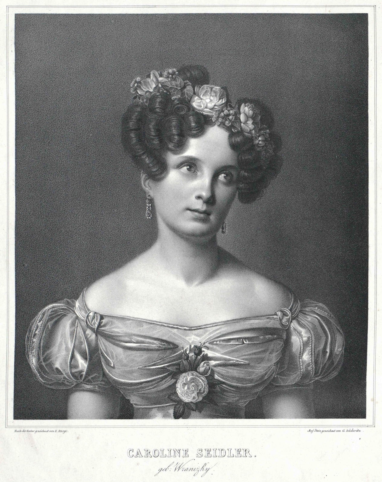 Caroline Seidler, geb. Wranizky (1790–1872)